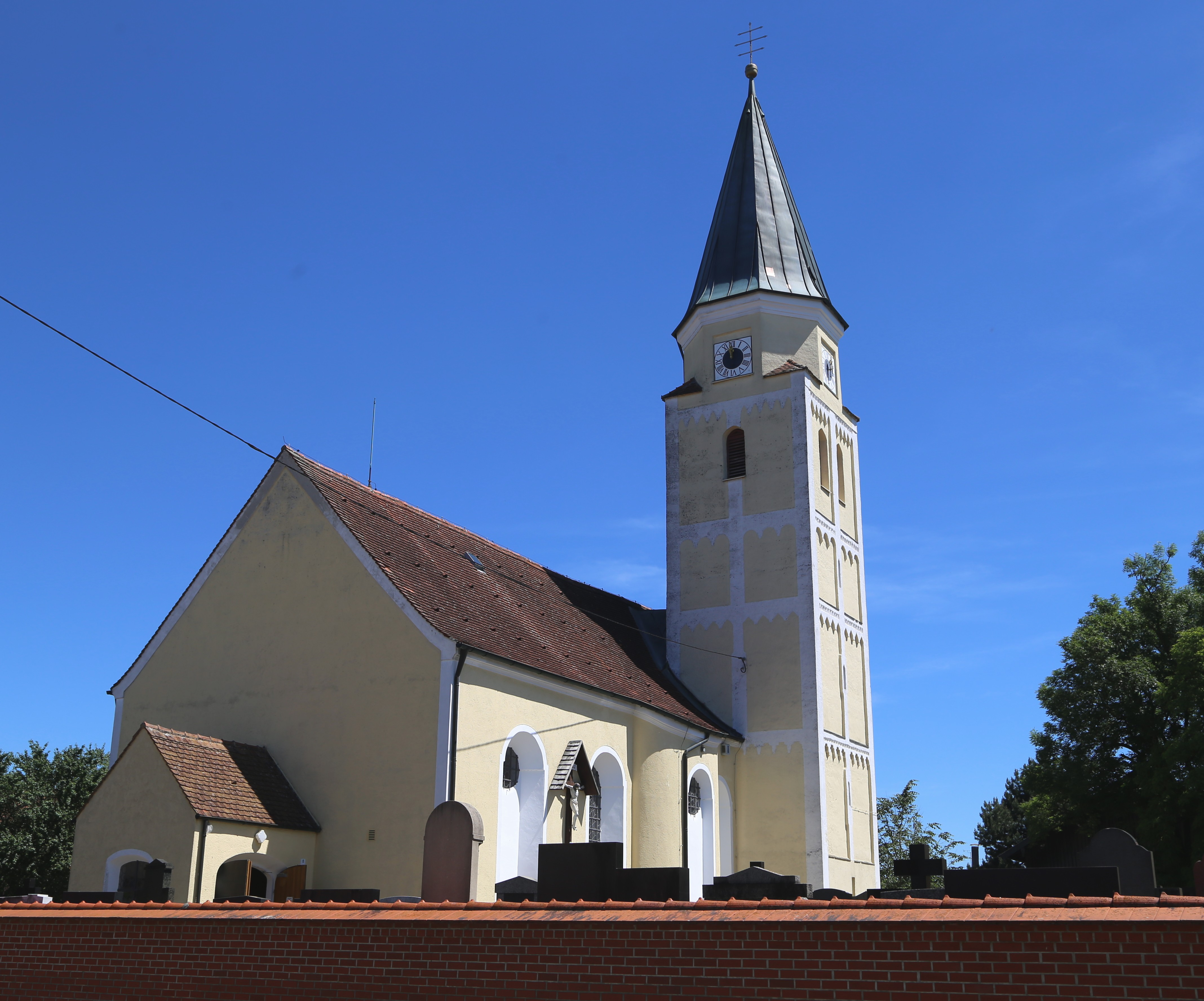 Hauptstraße 6, Pastetten; Katholische Pfarrkirche St. Martin, im Kern spätgotischer Saalbau mit eingezogenem Chor, Turm zweite Hälfte 14. Jahrhundert, barockisiert und mehrfach verändert; mit Ausstattung.